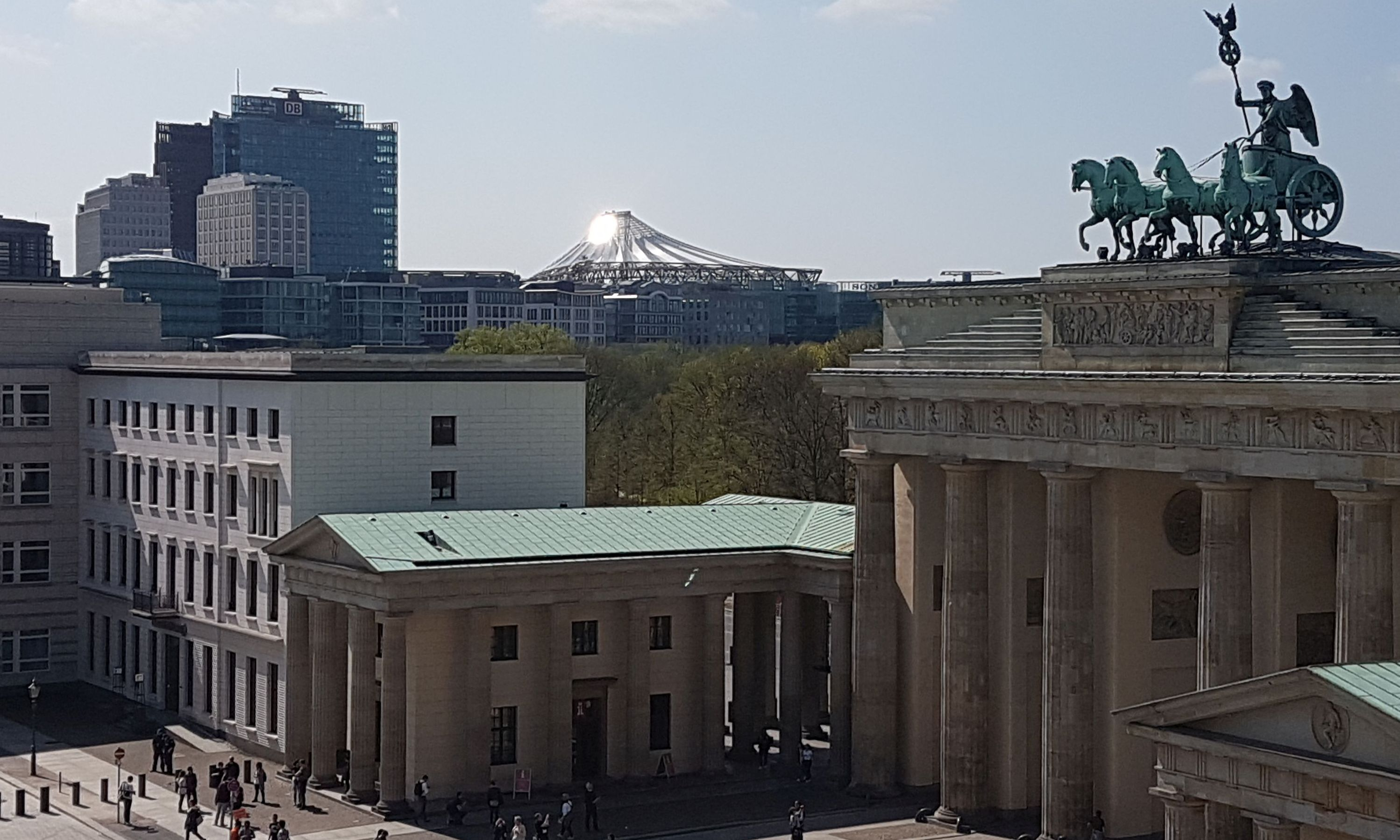 Das dem Fuji nachempfundene Sony Center von der Dachterrasse des Allianz Forums gesehen